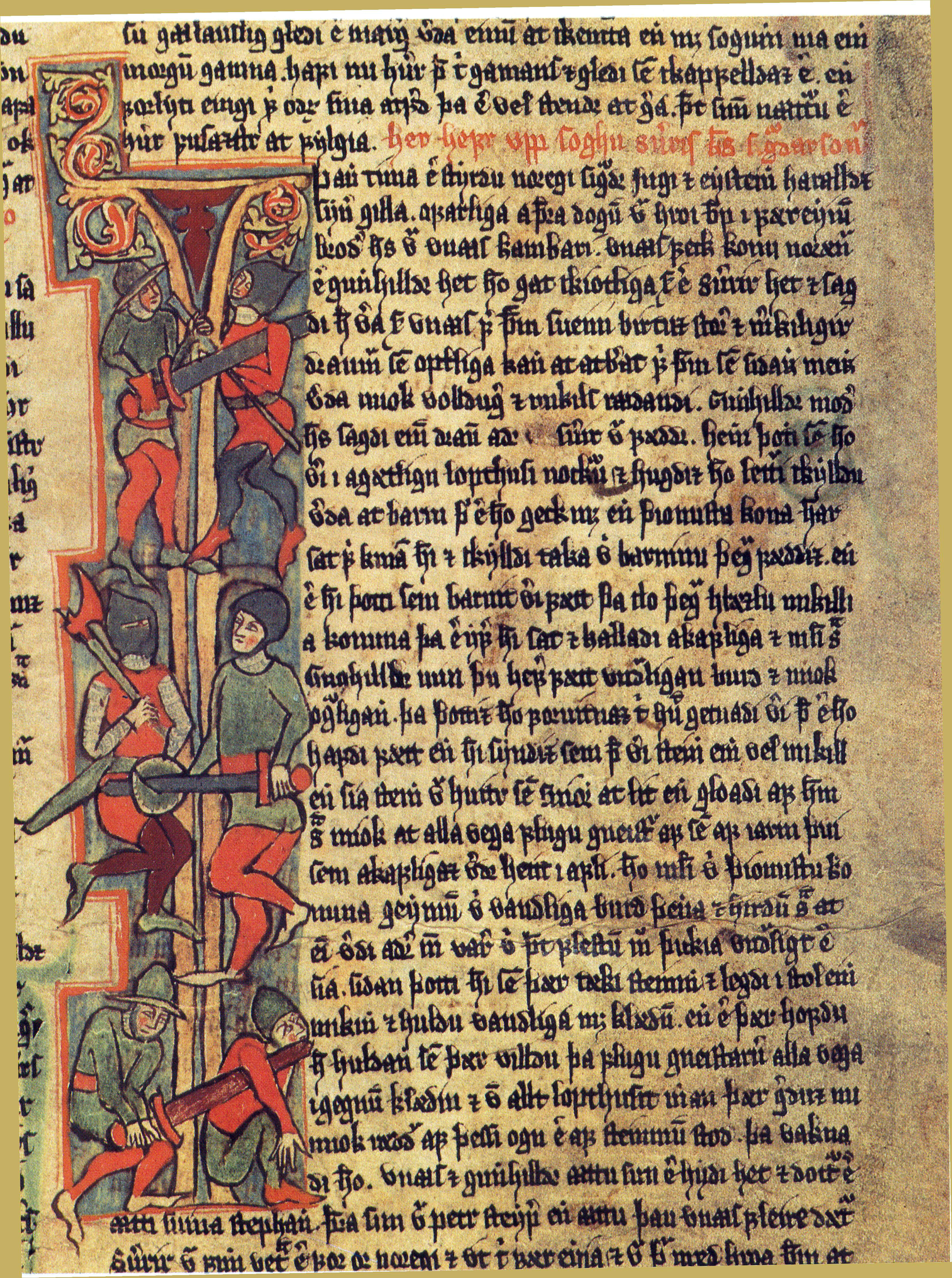 Initiale I